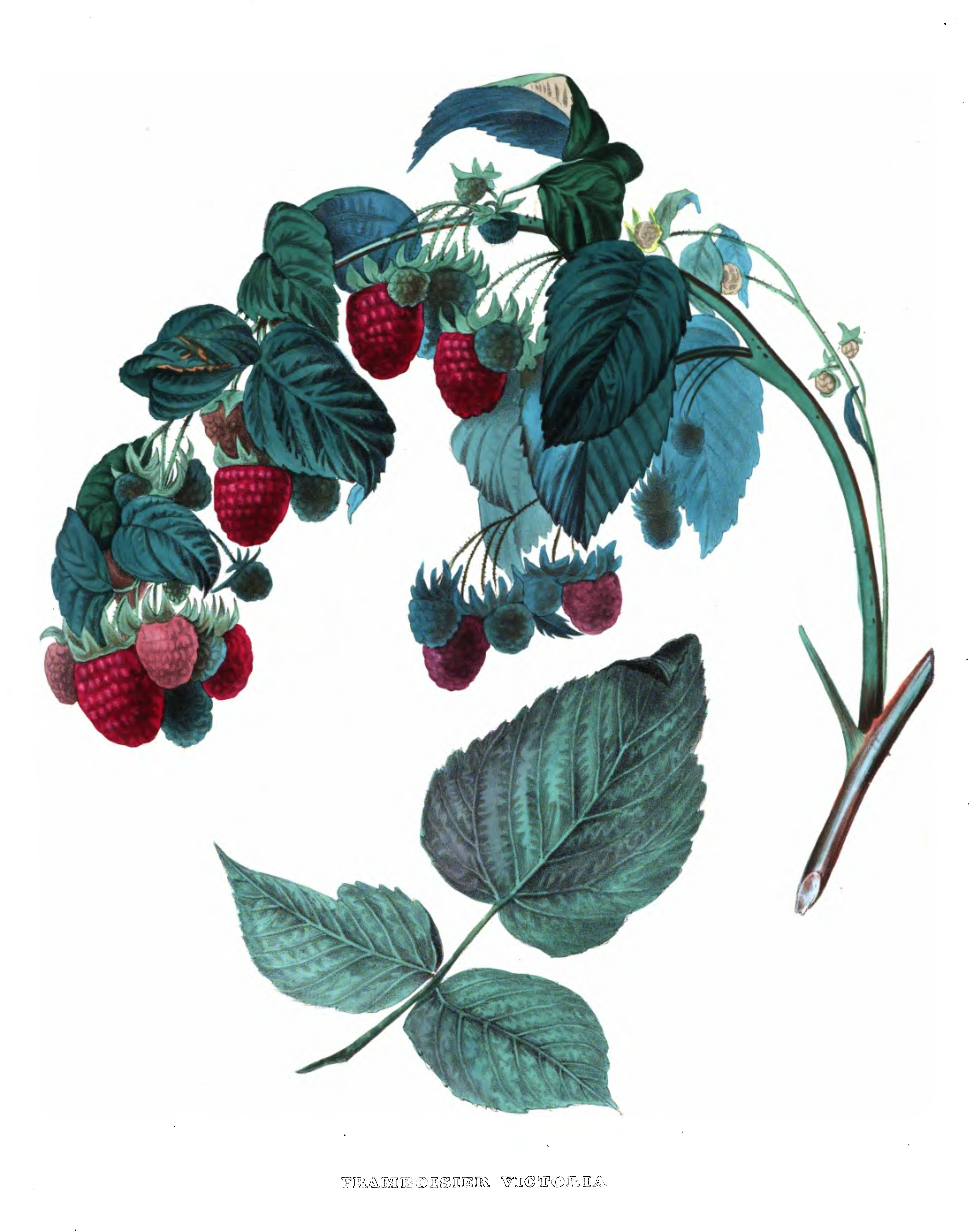 Annales de pomologie belge et étrangère, Première année (1853), sous la direction d'Alexandre Bivort, F. Parent, imprimeur-éditeur, Bruxelles